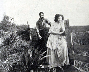 Gene Gauntier